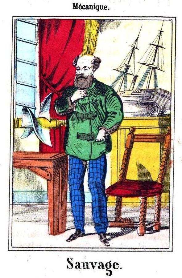 "Sauvage"